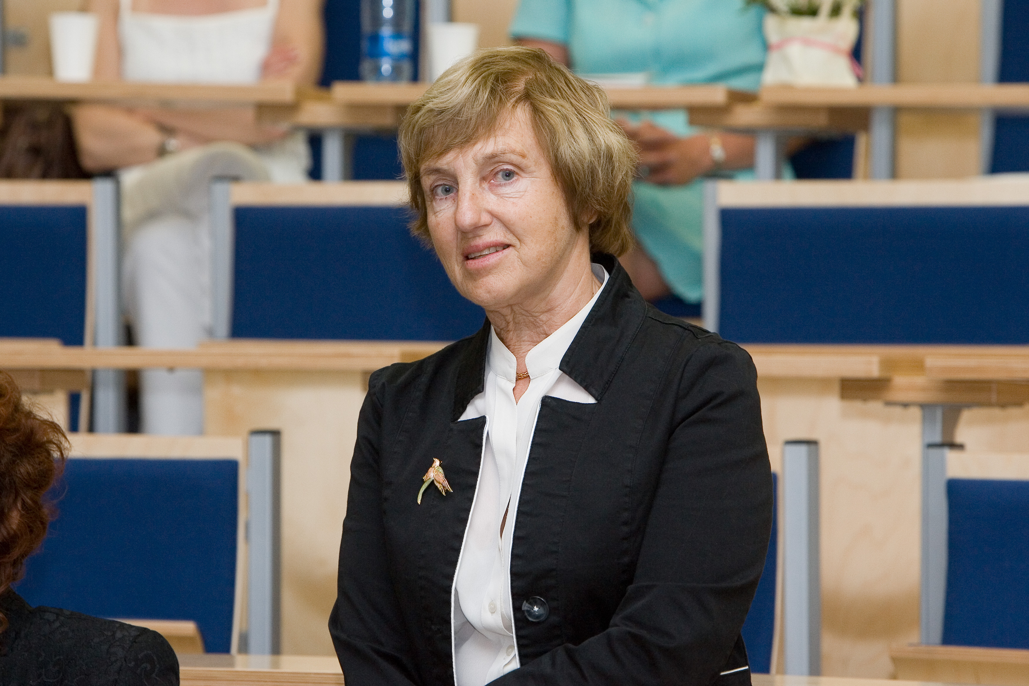 Professor Heidi-Ingrid Maaroos 6. juunil 2007 Puusepa 8 A. Linkbergi nim. auditooriumis Arstiteaduskonna Polikliiniku ja peremeditsiini õppetooli doktorandi Pille Ööpiku meditsiinidoktori kraadi taotlemiseks esitatud väitekirja “Management of depression in family medicine” („Depressiooni käsitlus peremeditsiinis”) kaitsmisel. Heidi-Ingrid Maaroos TÜ polikliinikust oli väitekirja juhendaja. Oponendid olid prof Airi Värnik (TÜ sotsiaalteaduskonna ja Karolinska Instituudi külalisprofessor) ja prof Veiko Vasar (TÜ psühhiaatriakliinik).